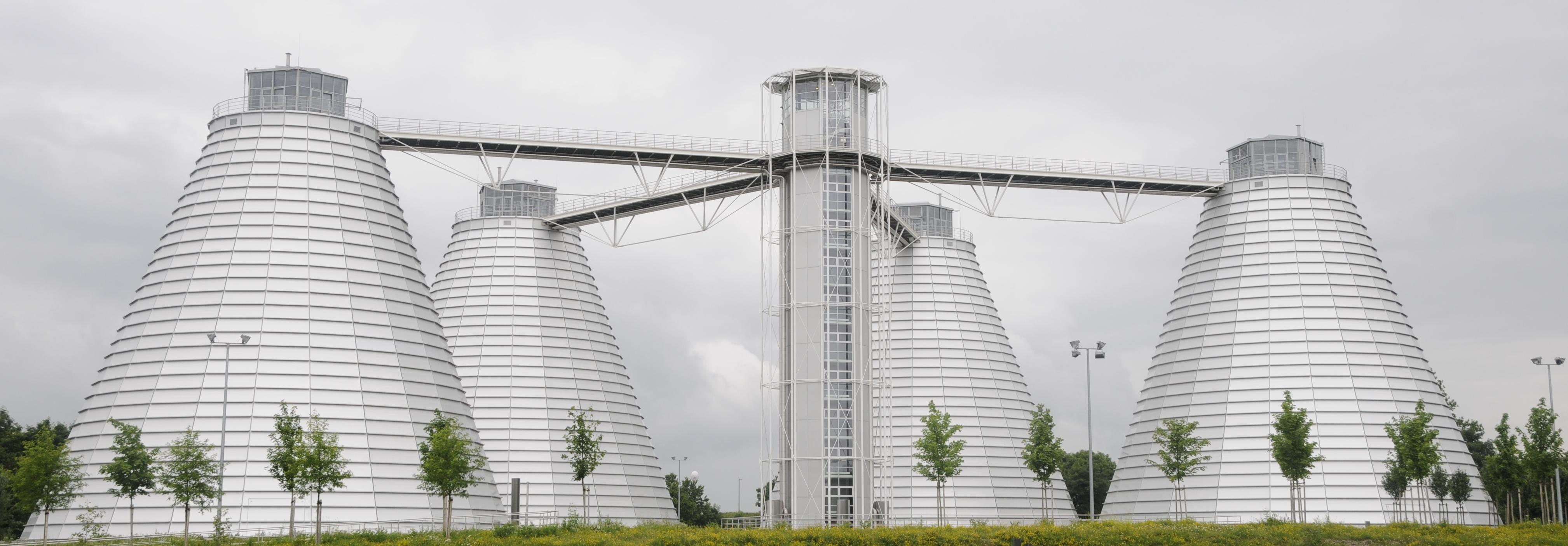 Faulturmanlage im Klärwerk Gut Großlappen